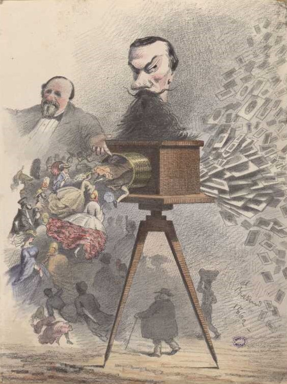 Caricature de Jean Nicolas Truchelut par Alexandre Bertrand - Bibliothèque d'étude et de conservation de Besançon